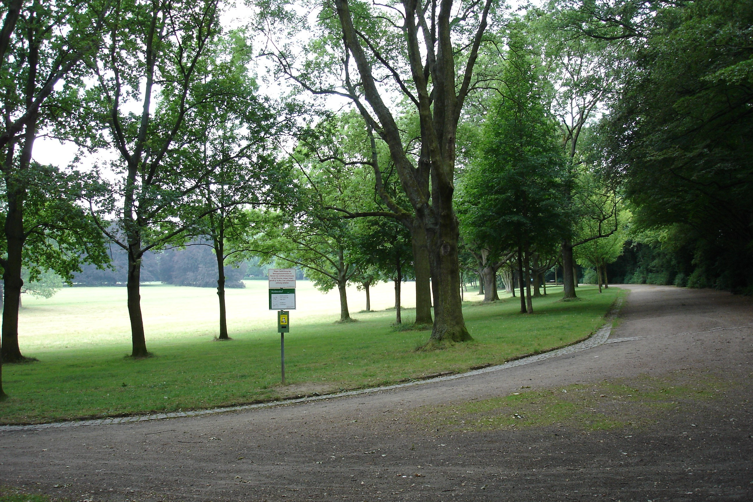 Huthpark, Blick von Nordost-Ecke